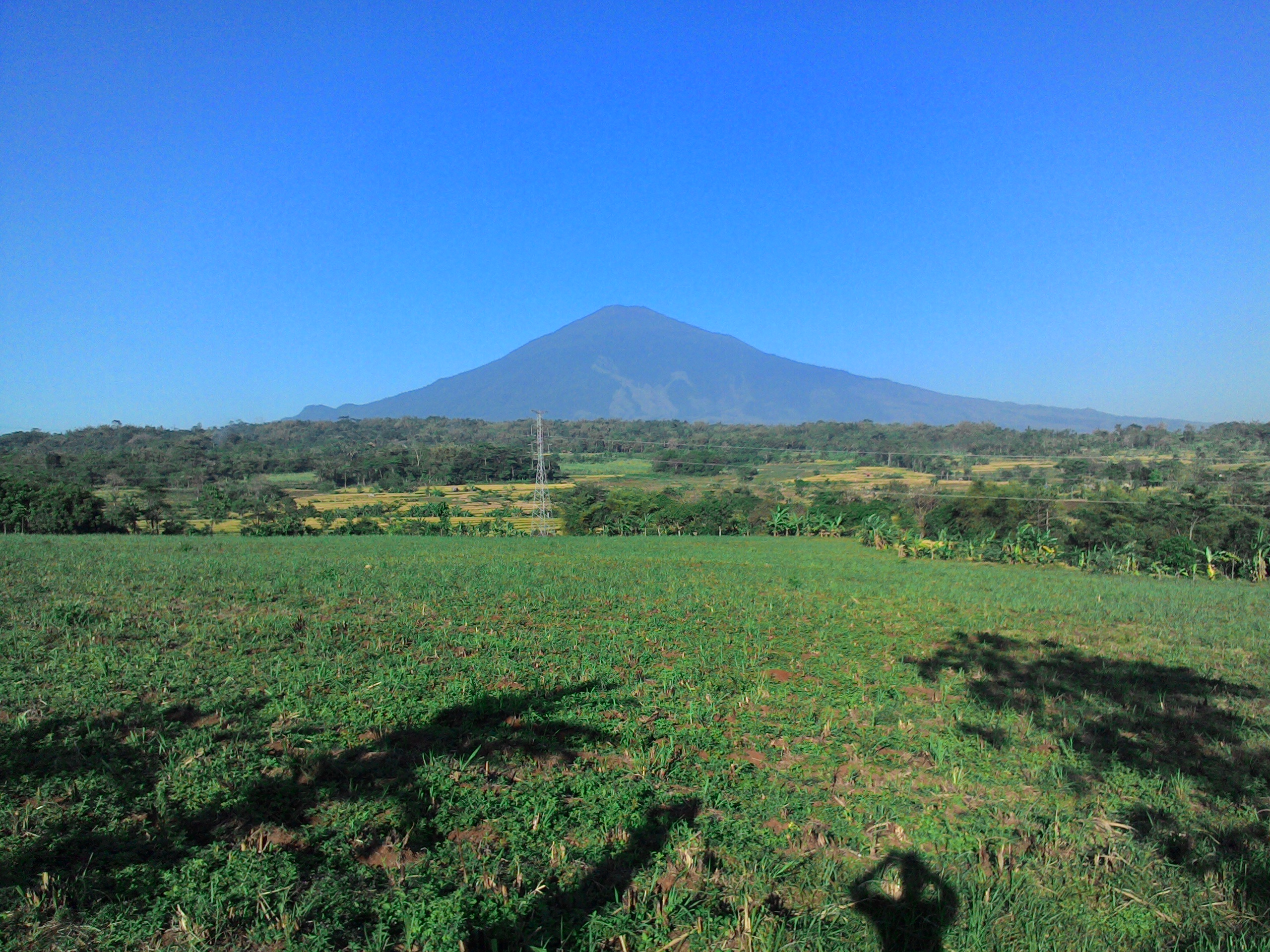 Pemandangan kaki gunung di Gunung Ciremai dengan sawah-sawah